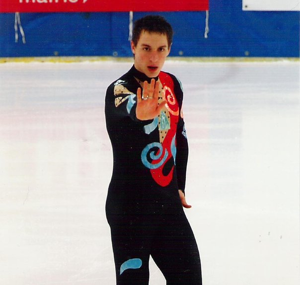 Départ